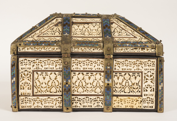 Arqueta de Palencia (Periodo de los Reinos Taifas). Número de inventario: 57371.